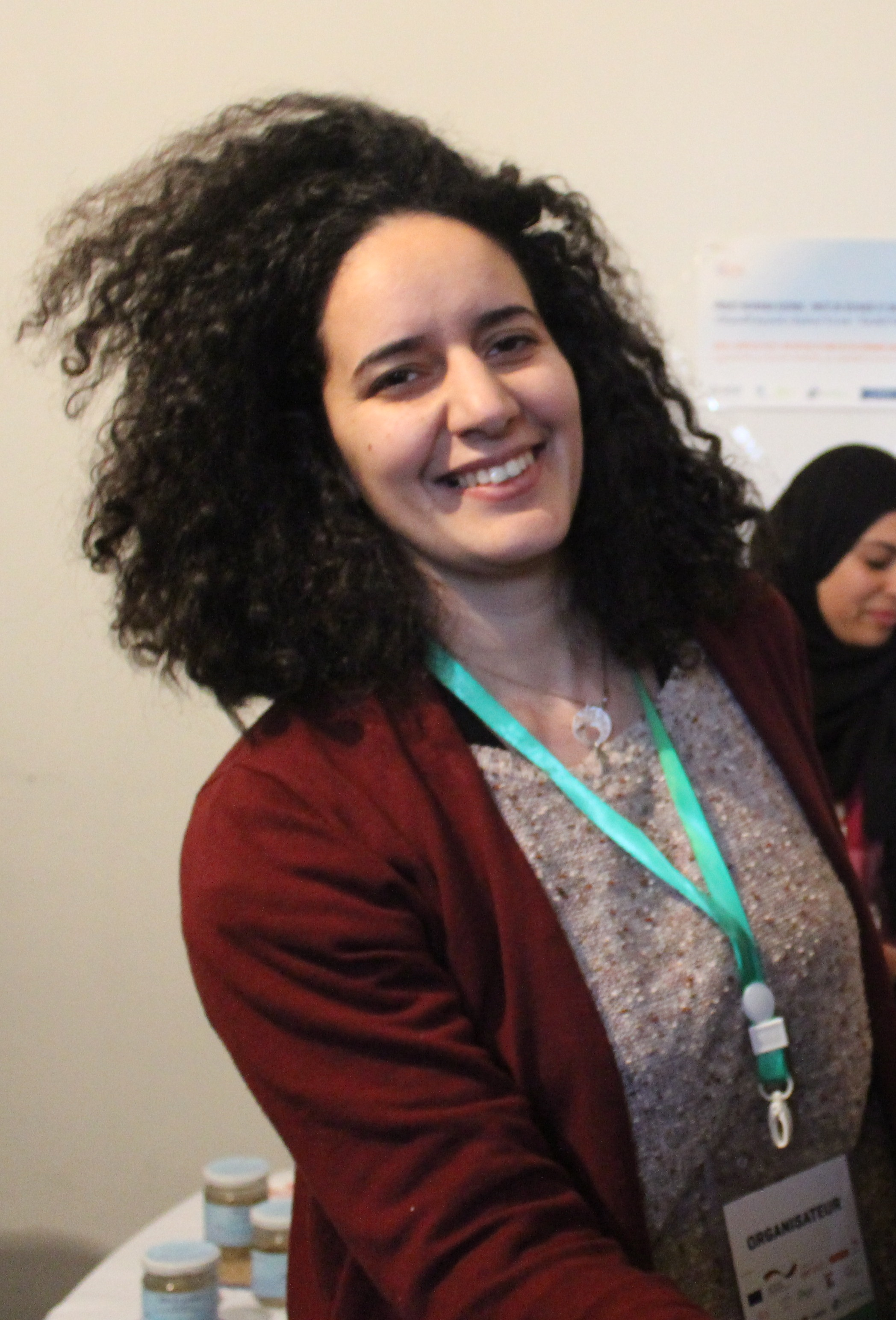 Asma Mansour during Lingare L'Mdina's opening event